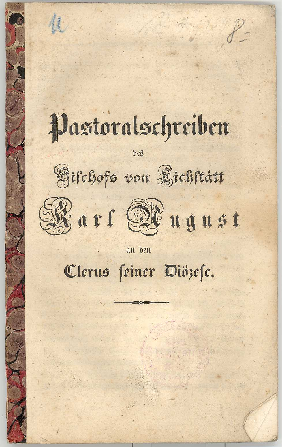 Titelseite des Pastoralschreibens des Eichstätter Bischofs Karl August von Reisach vom 25.02.1842